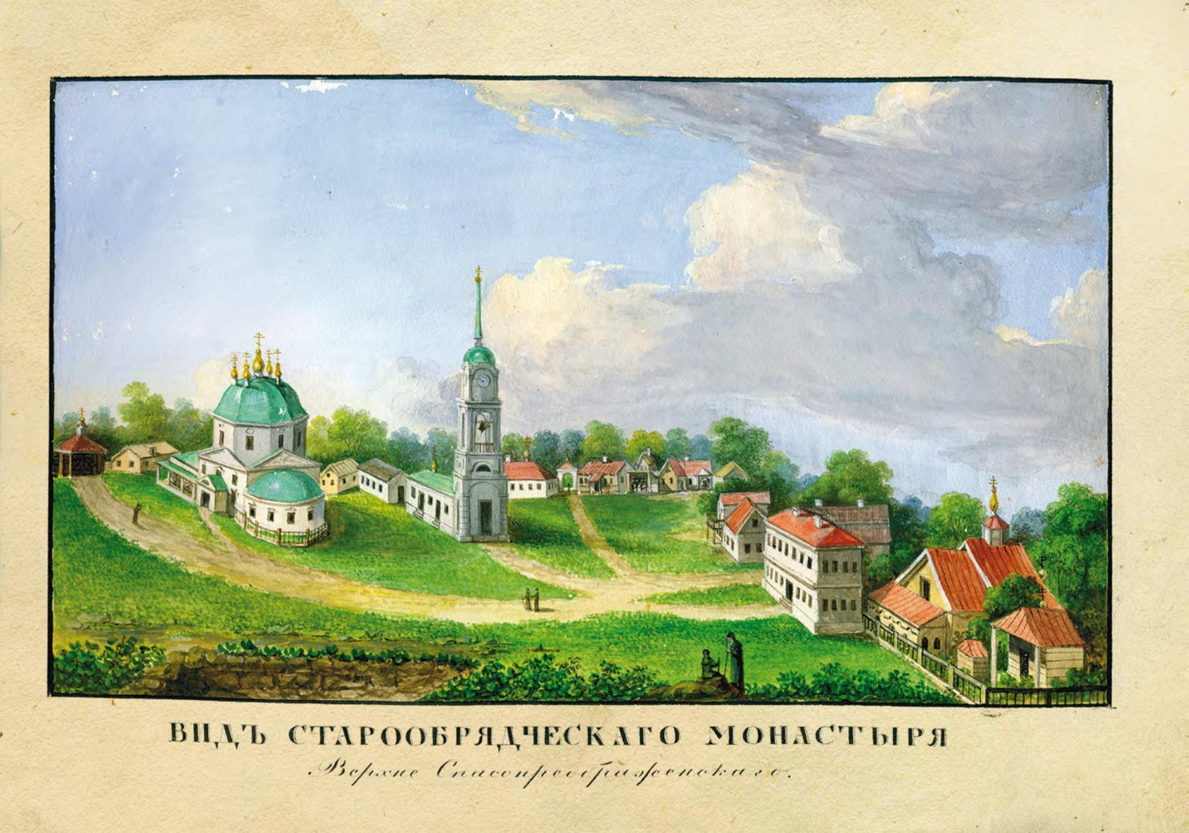 Верхне-Спасо-Преображенский монастырь в середине XIX века